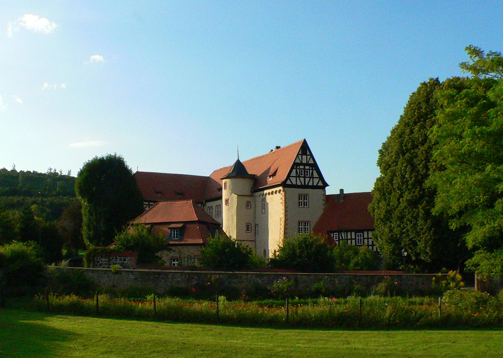 Hofgut Leustadt in Stockheim, Gemeinde Glauburg, Hessen, Deutschland